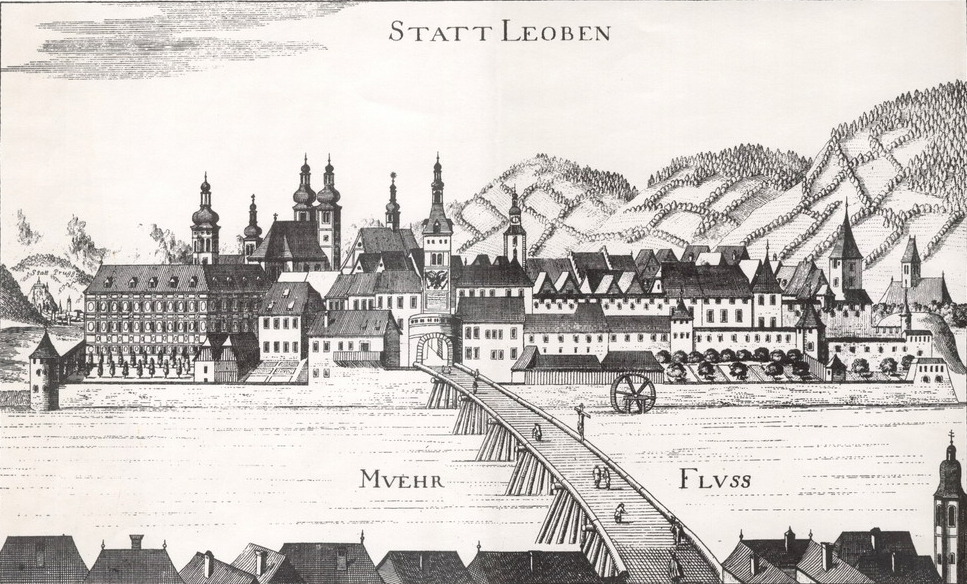 Leoben 1681